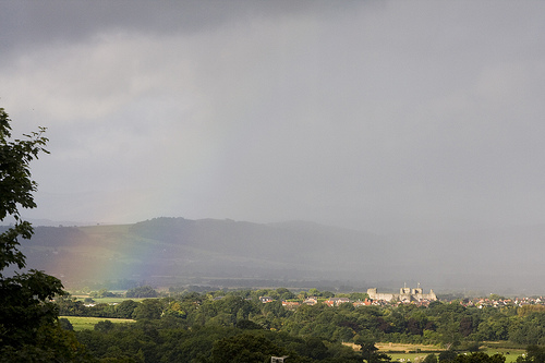 Панорамен изглед от Ридлан